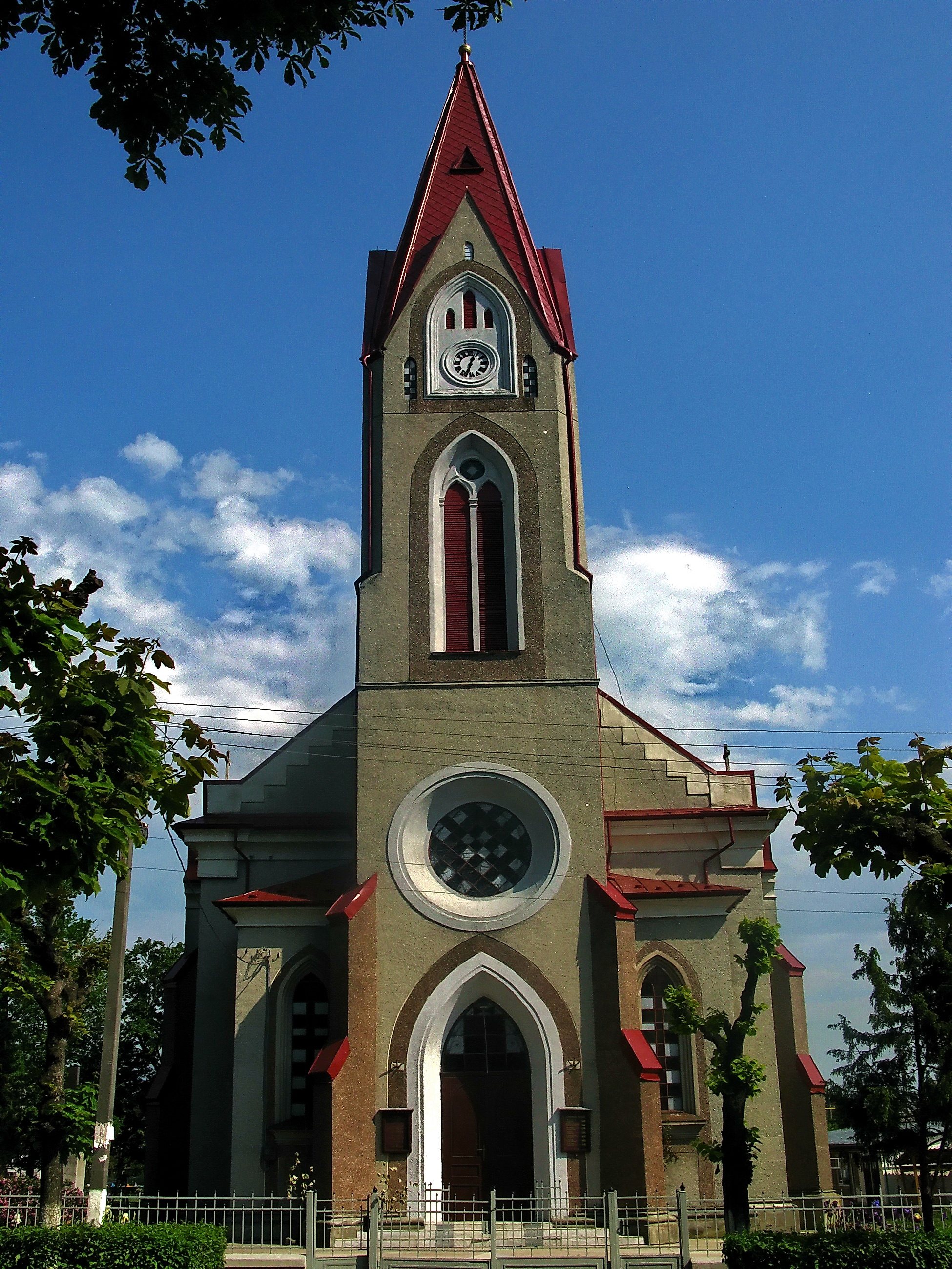 Римо-католицький костьол (Святої Анни) (мур.), м. Сторожинець, вул. Т. Шевченка, 32